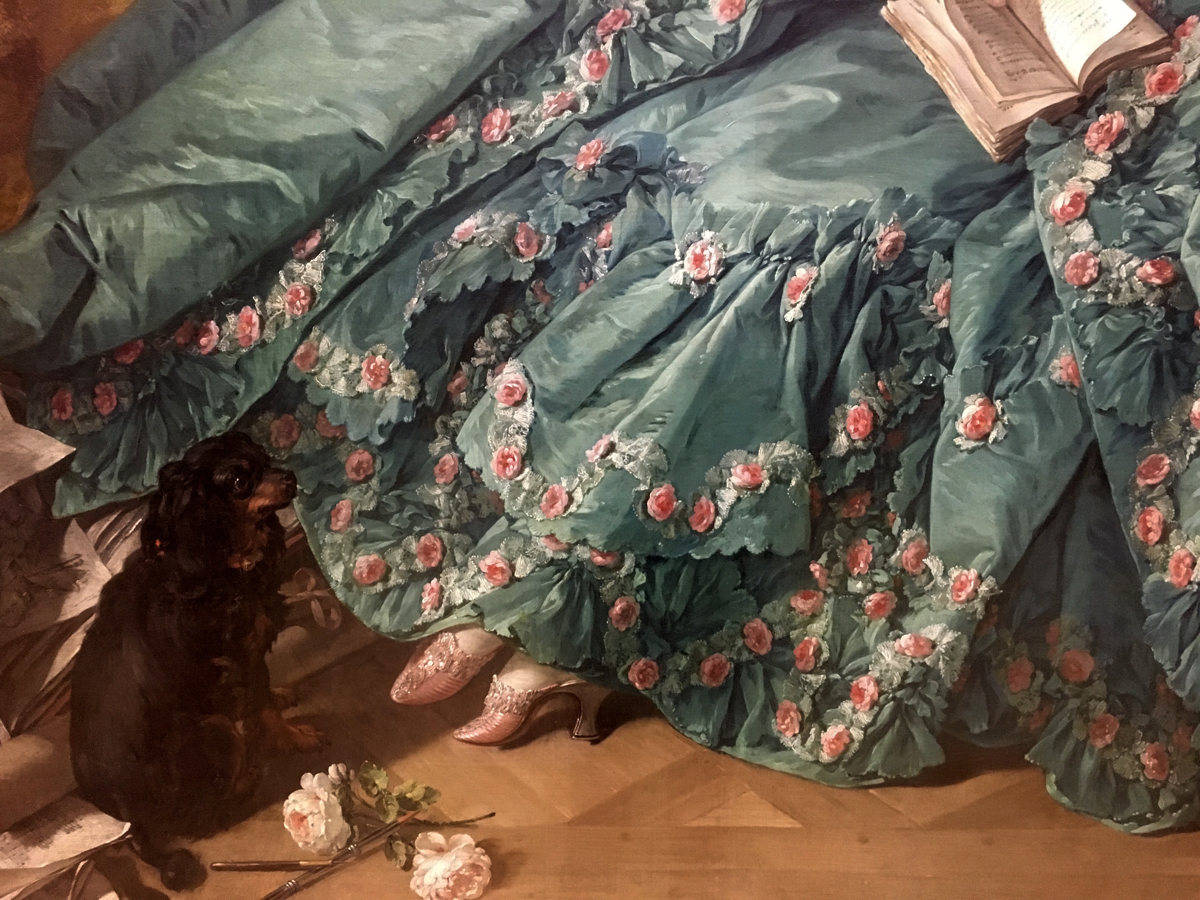 François Boucher. Retrato de Madame de Pompadour. Munich, Alte Pinakothek.